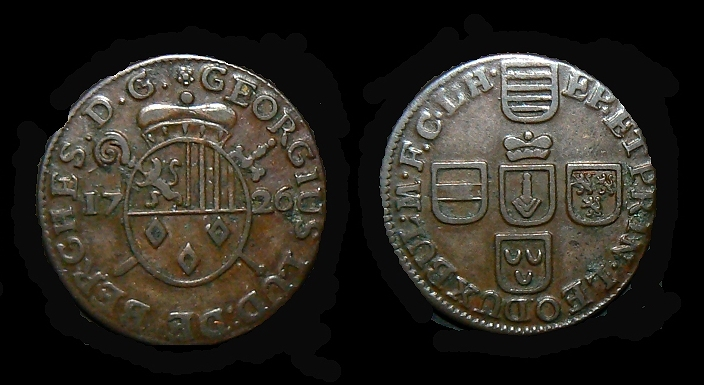 Monnaie liégeoise du Prince Evêque Georges Louis de Berghes. Chestret 674.